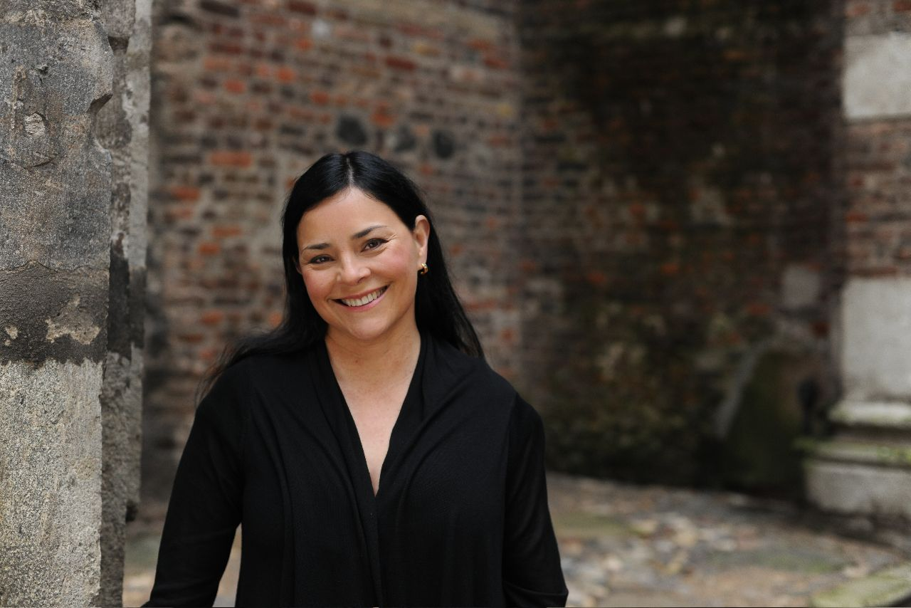 Portrait von Diana Gabaldon aus dem Jahr 2010